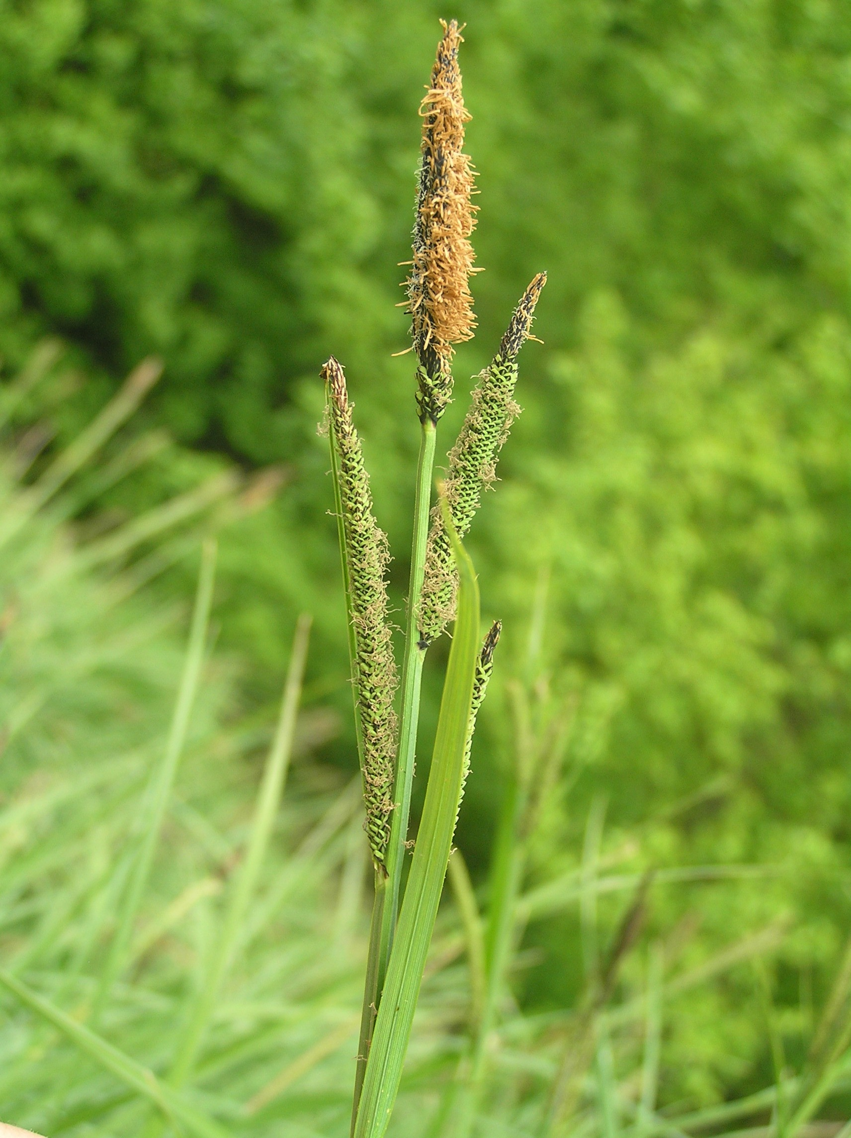 Carex elata, Břeclav, Czech Republic